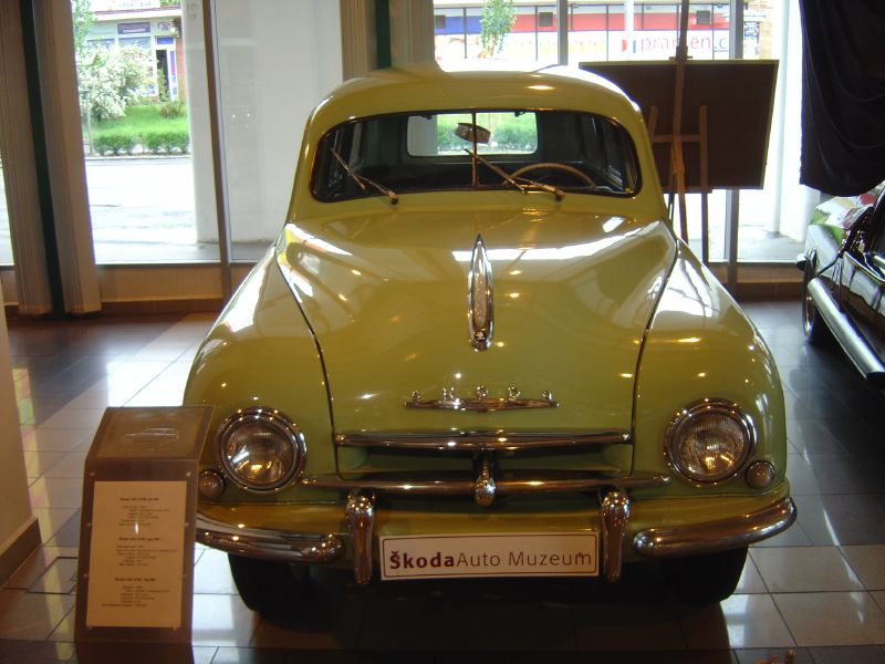 Škoda Auto Muzeum